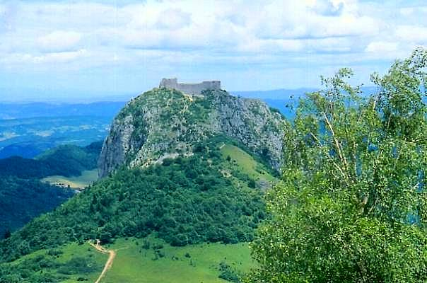 Der Berg Montségur mit der Ruine der gleichnamigen Katharerburg.